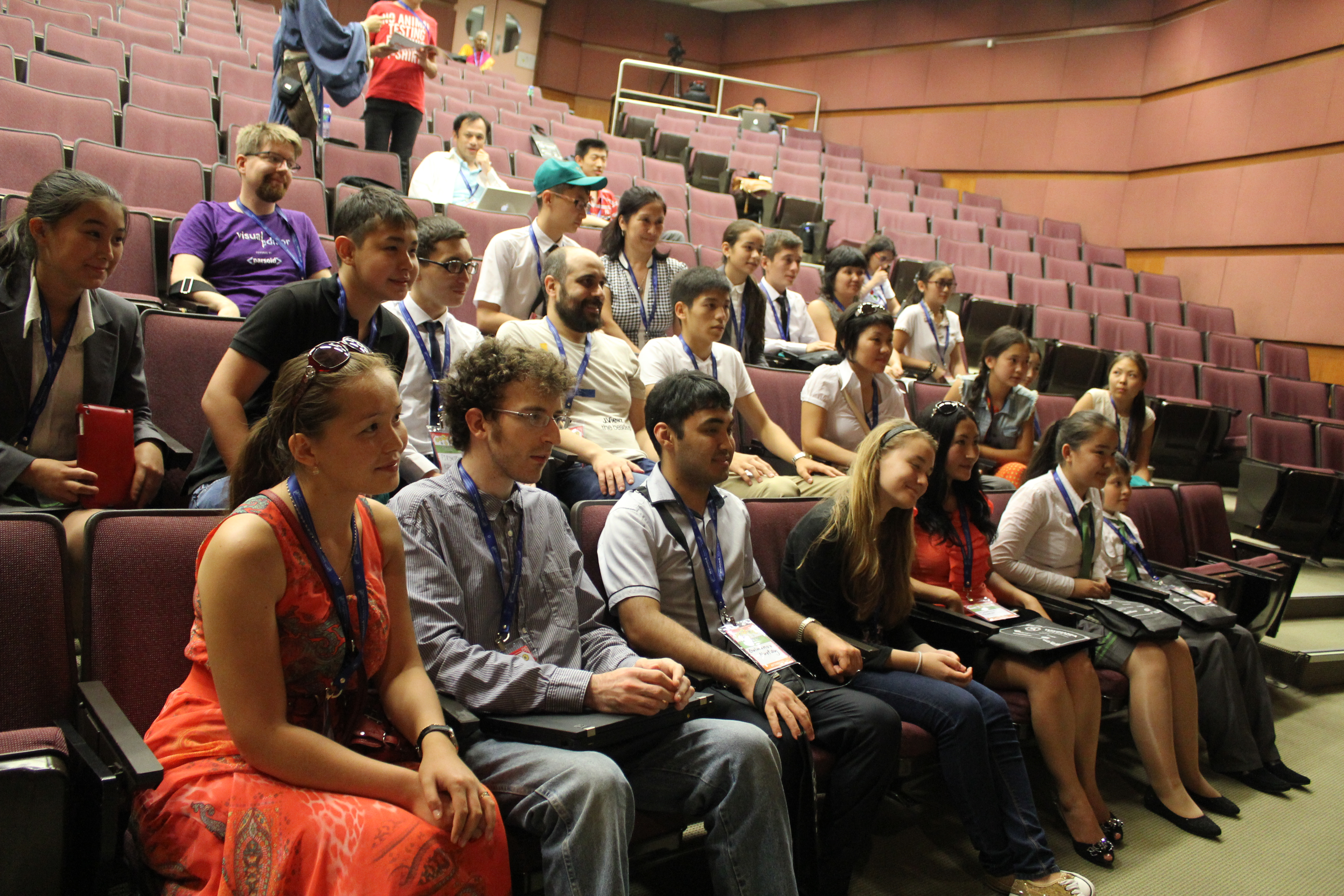 ગુજરાતી: અમીર કિર્ગીઝ ડેલિગેશન સાથે.